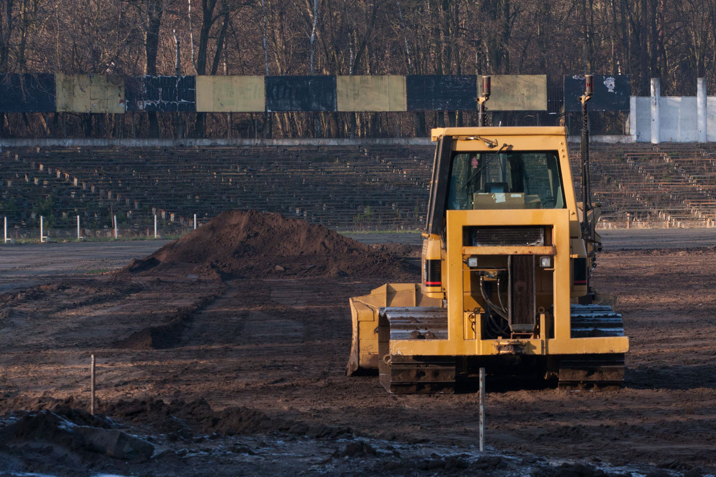 Rozpoczęcie przebudowy stadionu żużlowo-futbolowego na Golęcinie w Poznaniu, który będzie przeprowadzany w ramach Budżetu Obywatelskiego 2014.